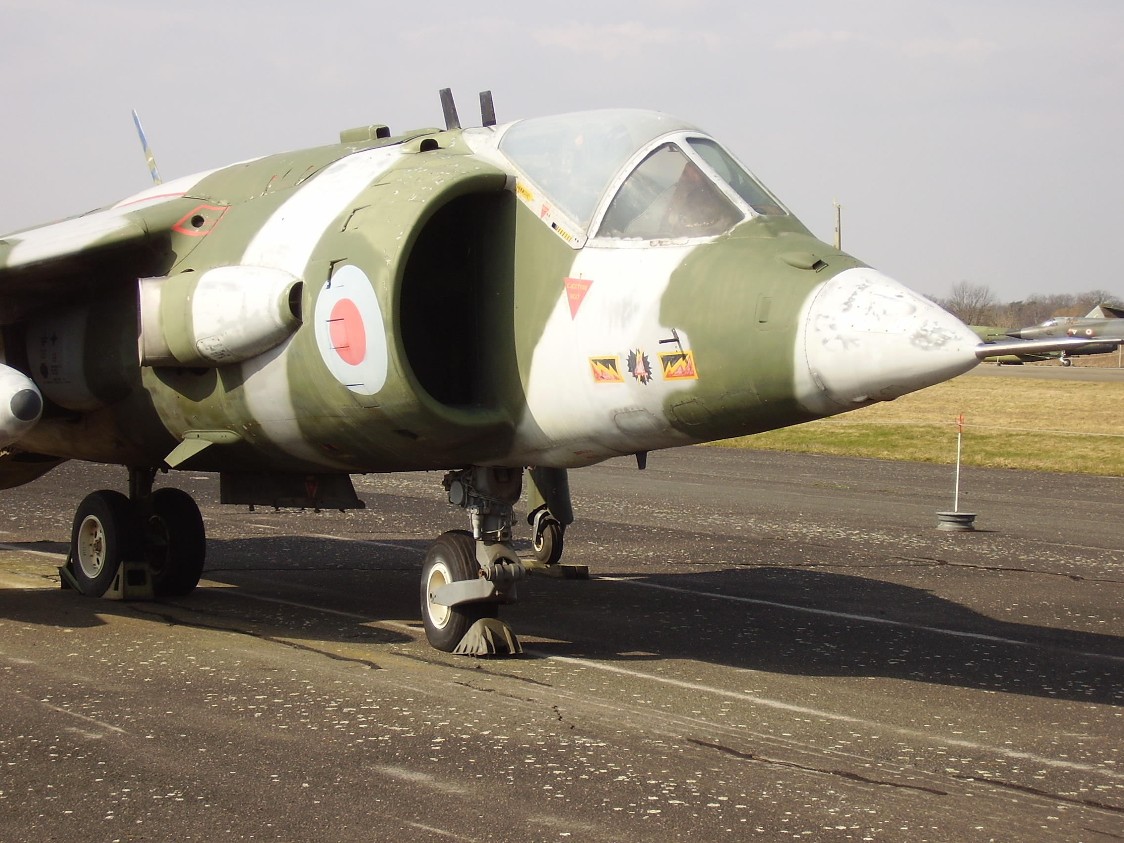 Luftwaffenmuseum der Bundeswehr; Airforce Museum of the Bundeswehr; Berlin-Gatow